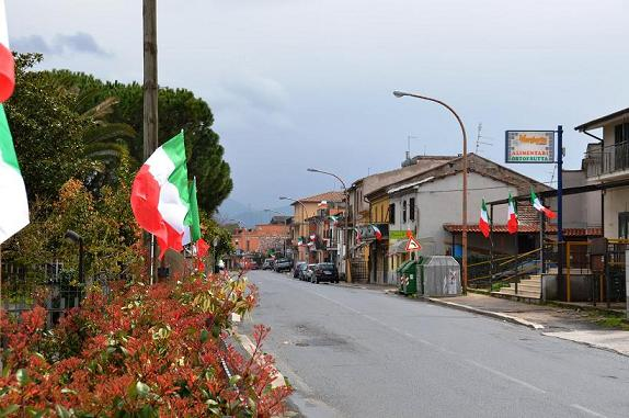 Massimo Quinzi, Scorcio di Via salaria vecchia (17 marzo 2011)